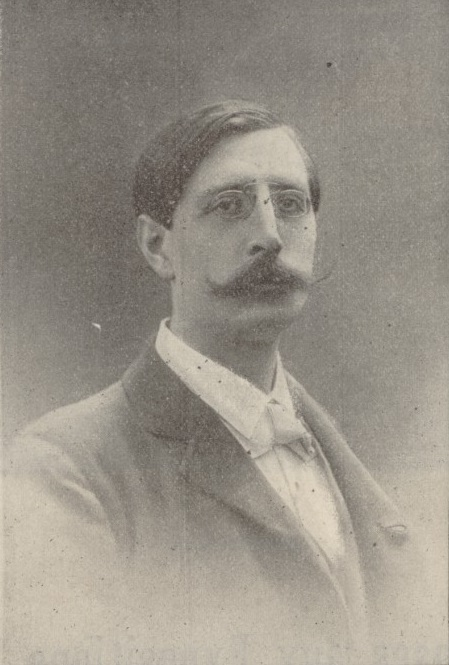 Léon Moreau par Eugène Pirou